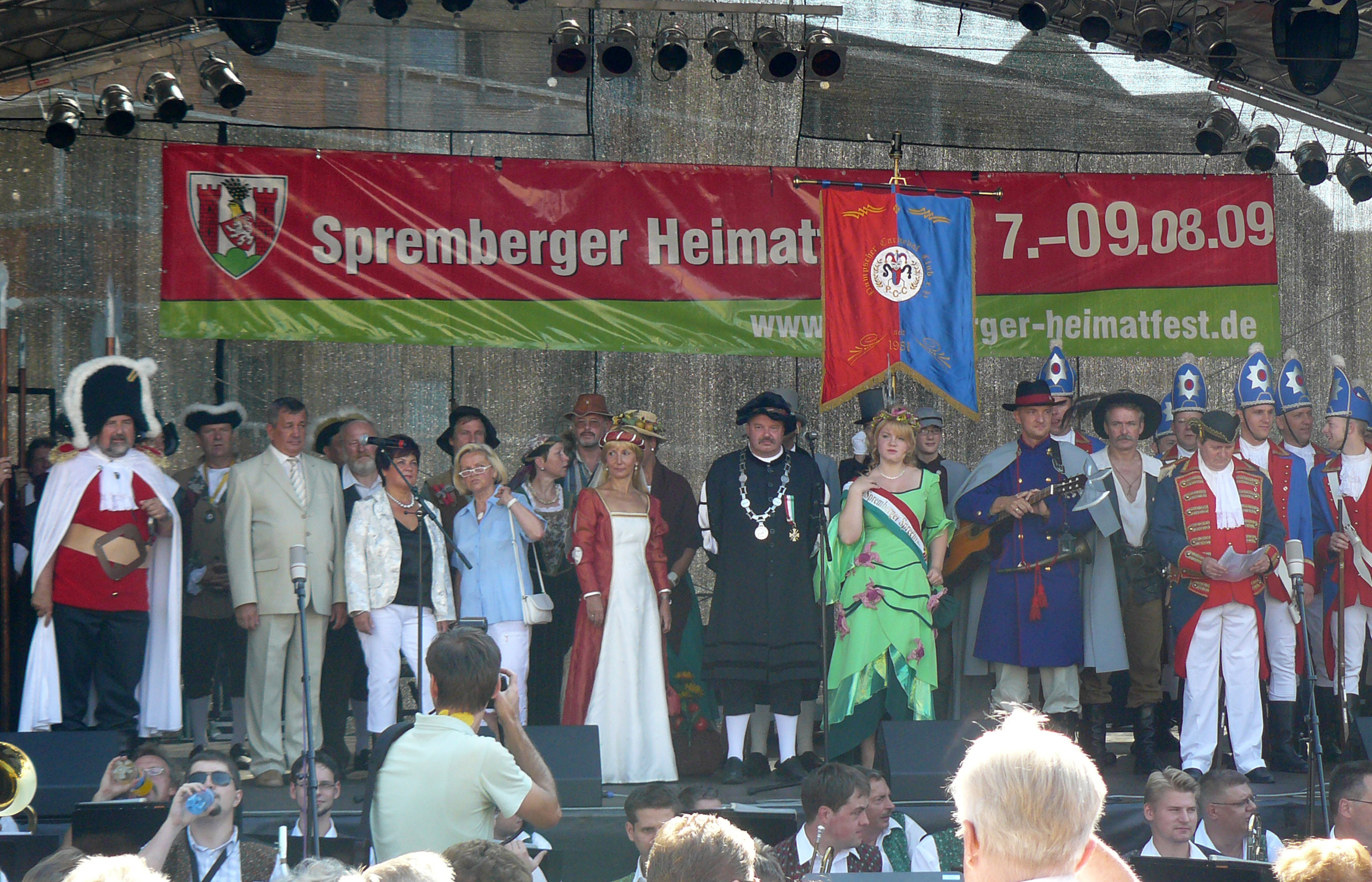 Eröffnung des Spremberger Heimatfest 2009 durch den Bürgermeister.